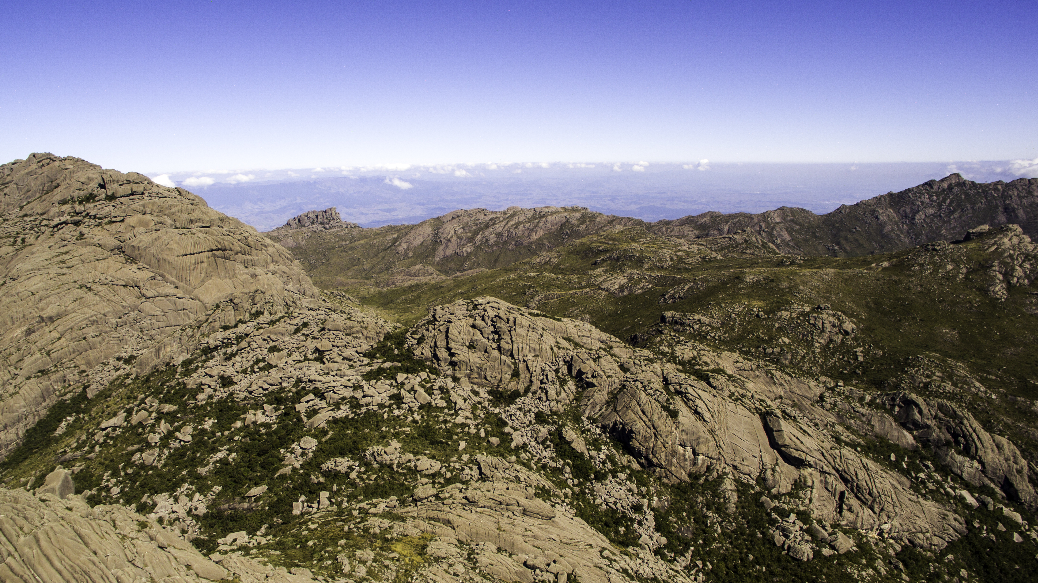 Nesta imagem é possível observar o Maciço das Prateleiras ao lado direito das agulhas negras. Ao centro é possível observar desde a base a formação da Pedra do Sino de Itatiaia, no canto superior esquerdo está o Pico das Agulhas Negras visto por traz da pedra do sino. À direita está a Pedra do Altar e atraz dela o Morro do colto.